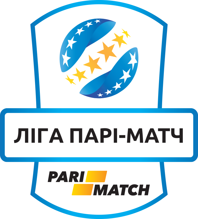 Логотип Ліги Парі-Матч з 2016 року